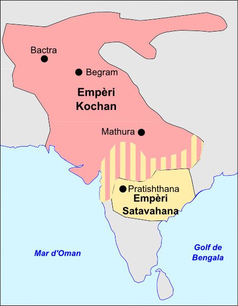 Division de la peninsula indiana au sègle I.